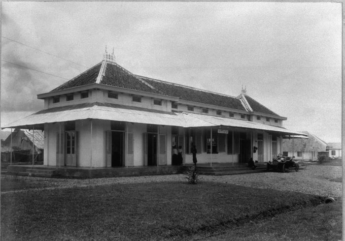 Foto. Het kantoor van de suikerfabriek van Poerworedjo, Midden-Java